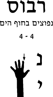 rebus in hebrew